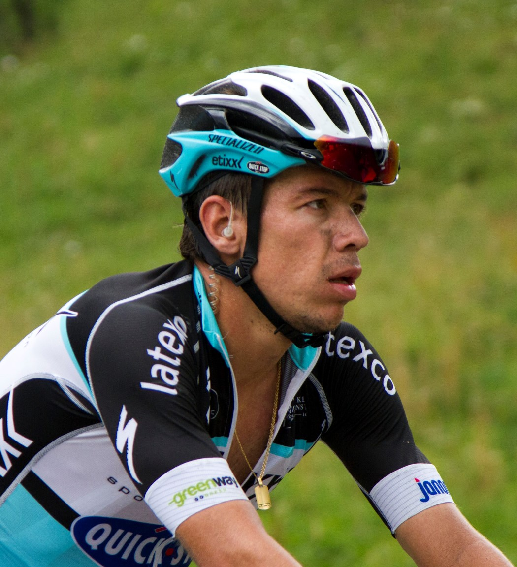 201 uran